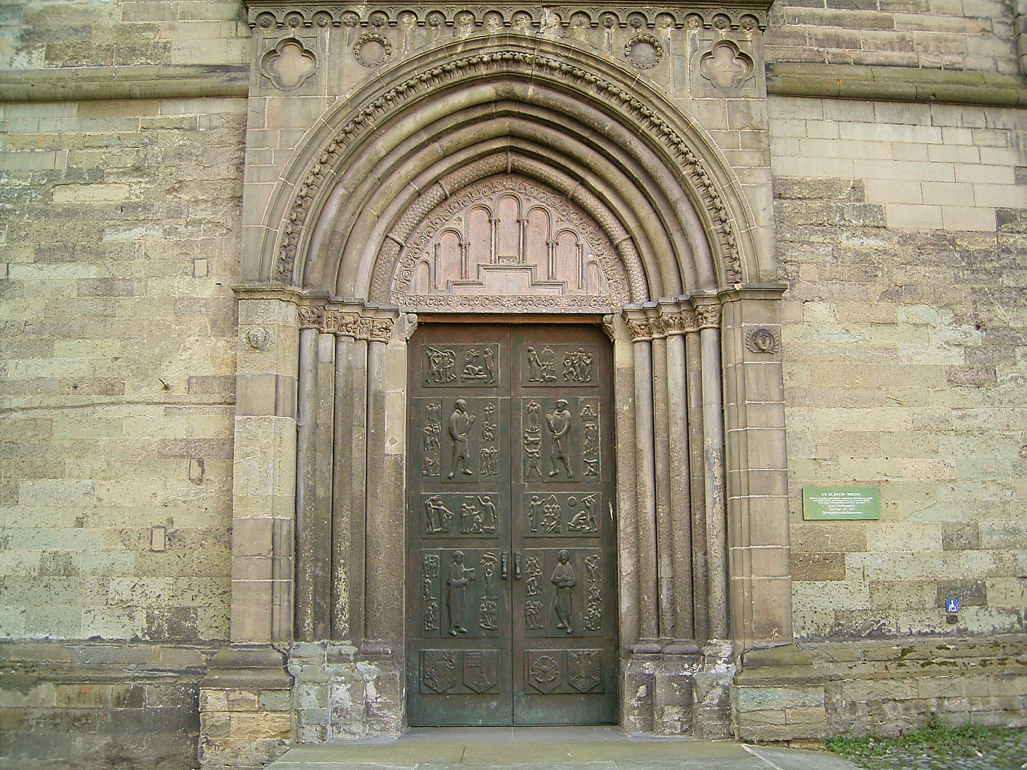 St. Petri-Kirche in Soest